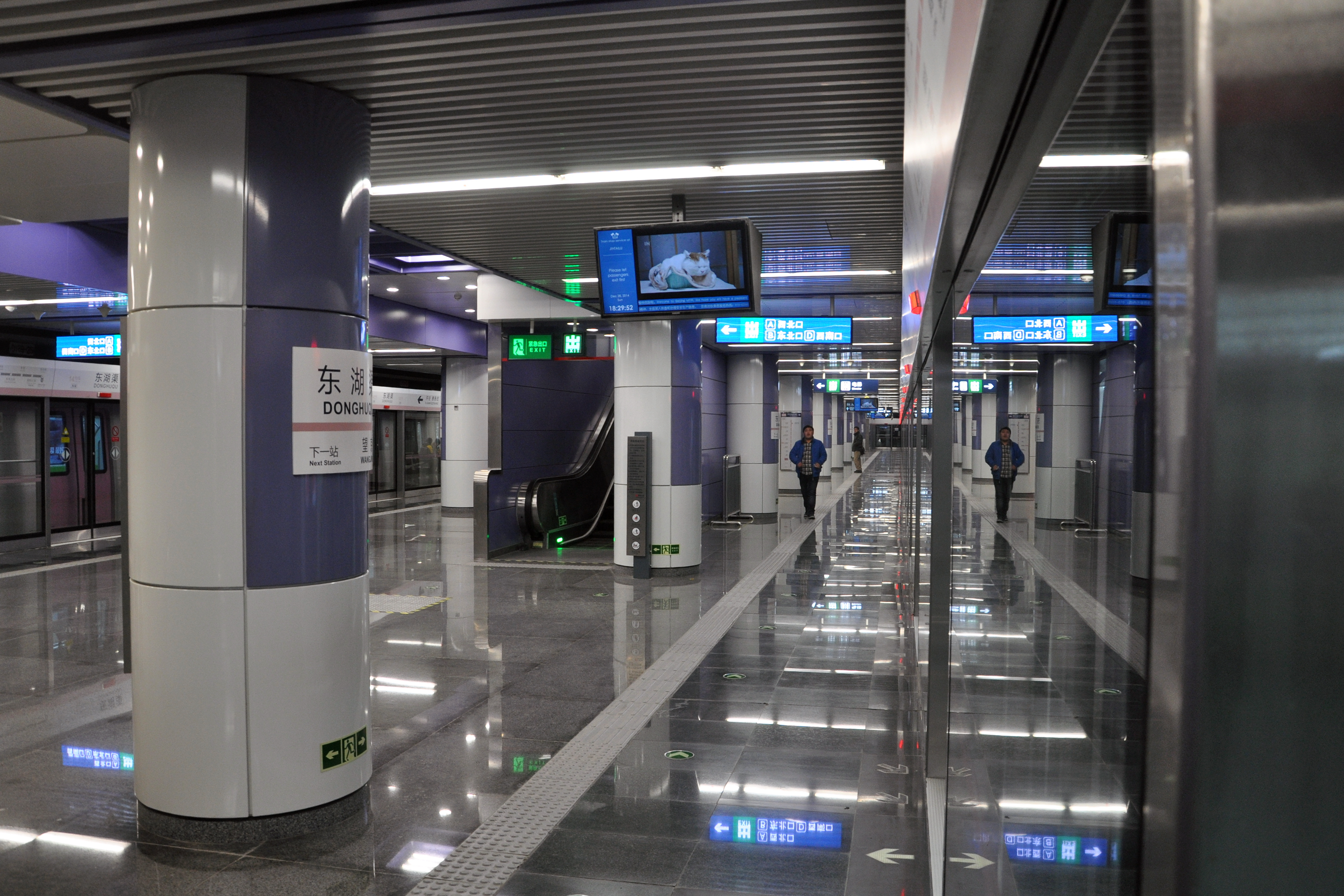 北京地铁14号线东湖渠站站台